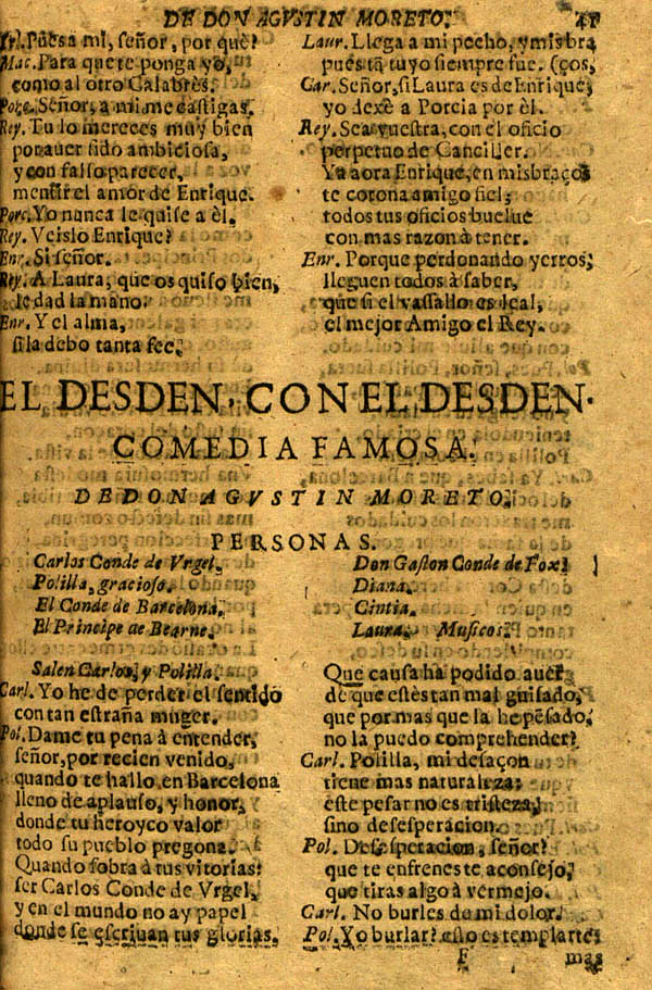 Incipit (f. 41r) de la comedia "El desdén con el desdén" en la 2ª ed. de Moreto, Agustín (1618-1669), Primera parte de comedias de Don Agustín Moreto y Cabaña, Madrid, Andrés García de la Iglesia, 1677. Digitalización de la Biblioteca Virtual Miguel de Cervantes, Alicante, 2009, a partir de un ejemplar conservado en la Biblioteca del Centro de Documentación y Museo de las Artes Escénicas del Instituto del Teatro de Barcelona. Sig. 59198, Sig. 59209